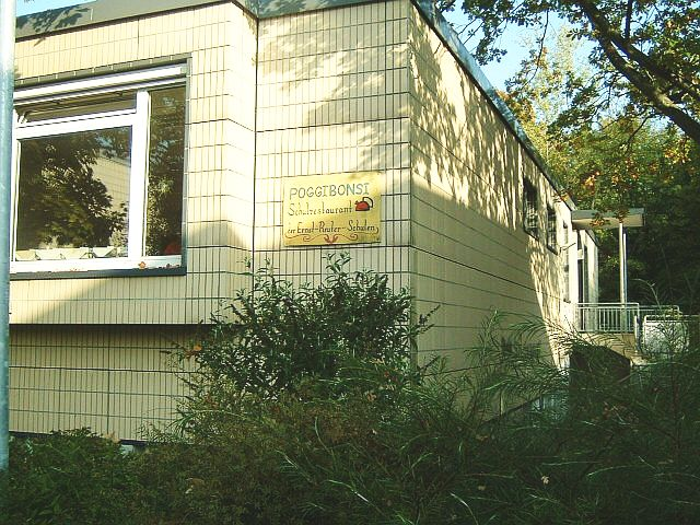 Ernst-Reuter Schule in Frankfurt Main, Artikel siehe , selbst fotografiert am 12.10.2005--Peng 09:18, 13 October 2005 (UTC)